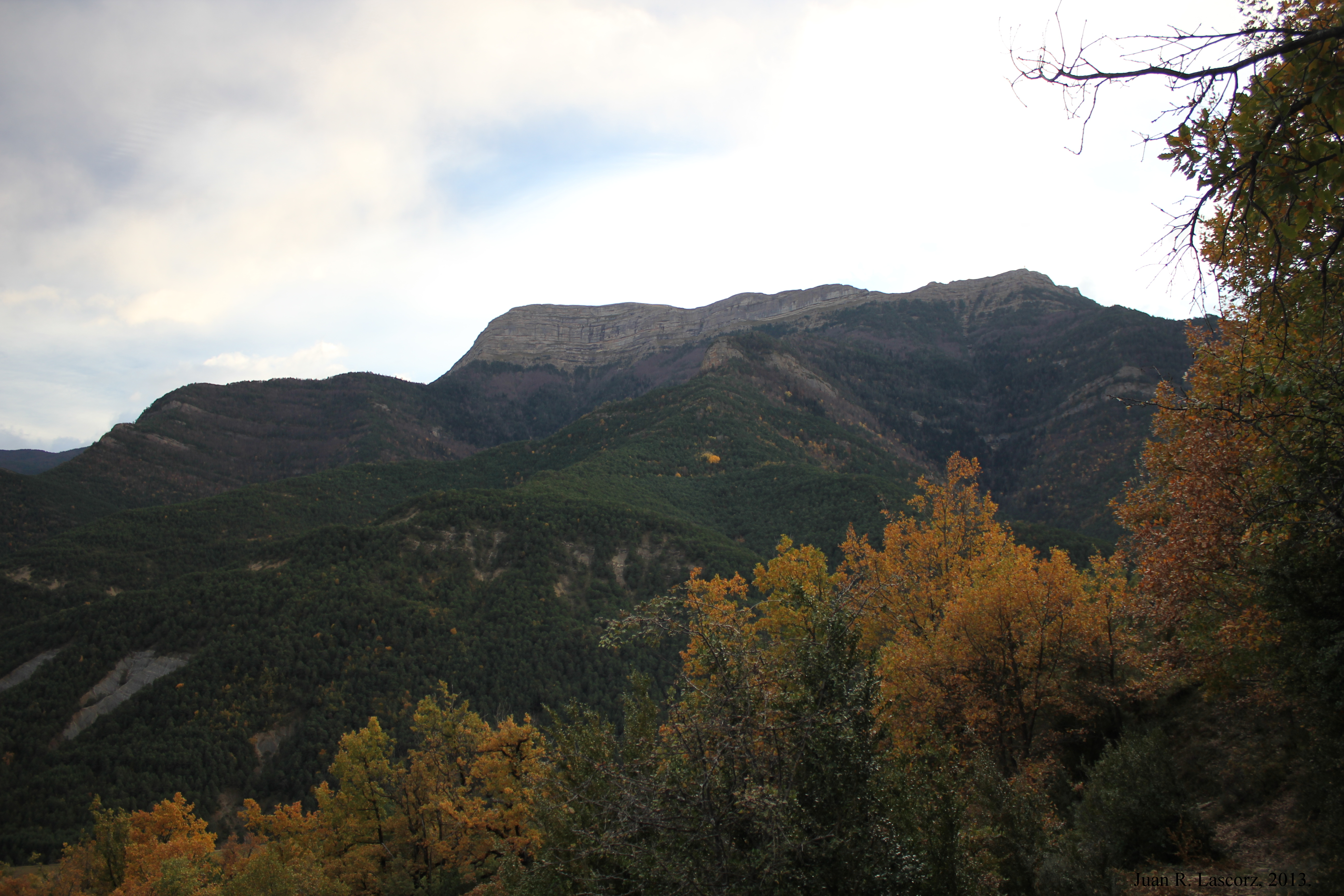 Aragonés: A penya de Canciás dende a metat de puyada de Lardiés ta Berroy, (Fiscal, Sobrarbe).